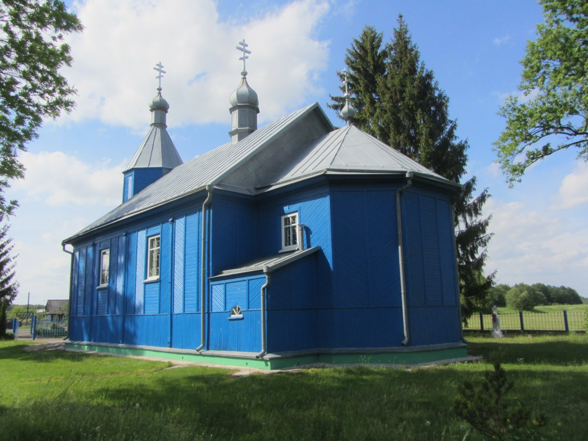 Спаса-Праабражэнская царква ў вёсцы Трасцяніцы Камянецкага раёна Брэсцкай вобласці Беларусі. Выгляд з боку апсіды.